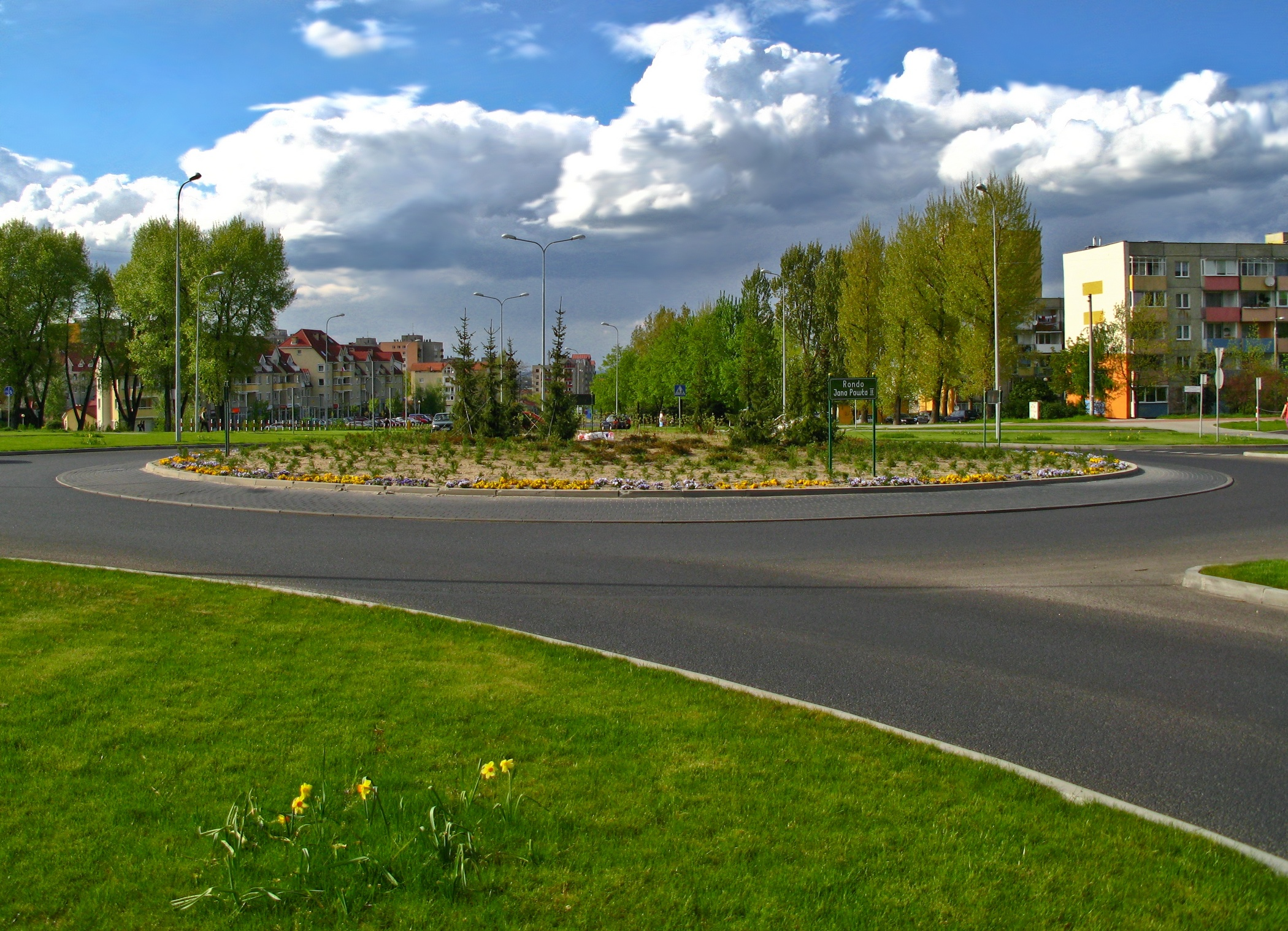 Zielona Góra, Rondo Jana Pawła II